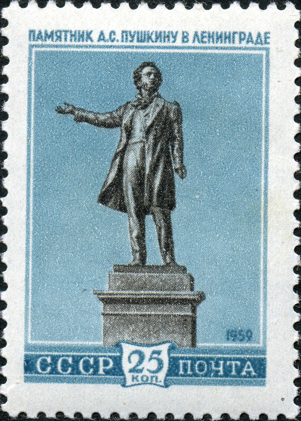 Марка СССР